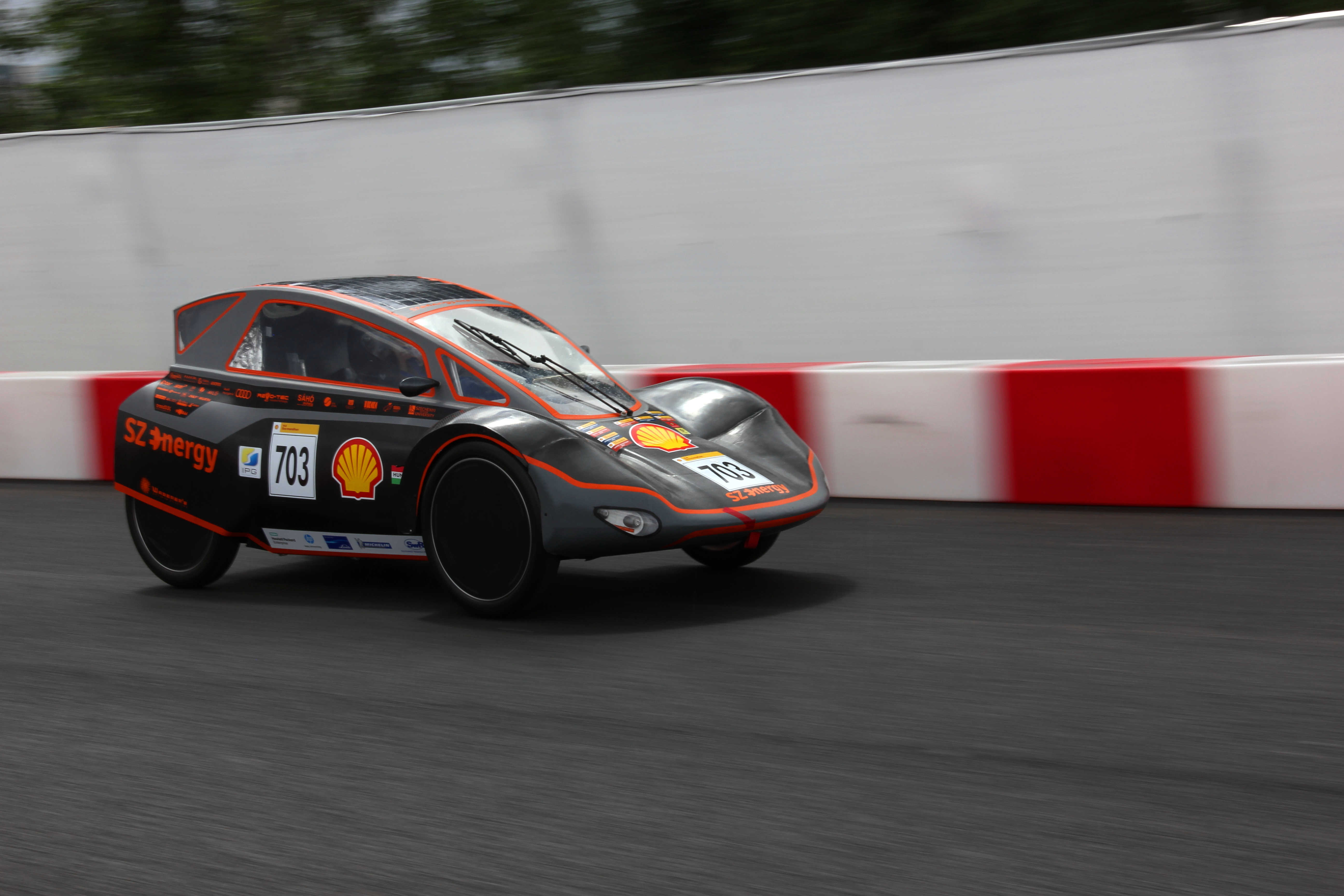 A SZEnergy team jelenlegi versenyautója